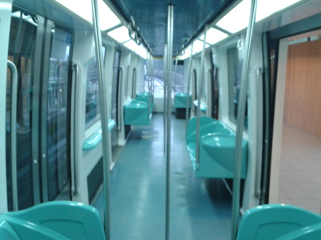 Intérieur d'une rame VAL 208 sur le réseau lillois